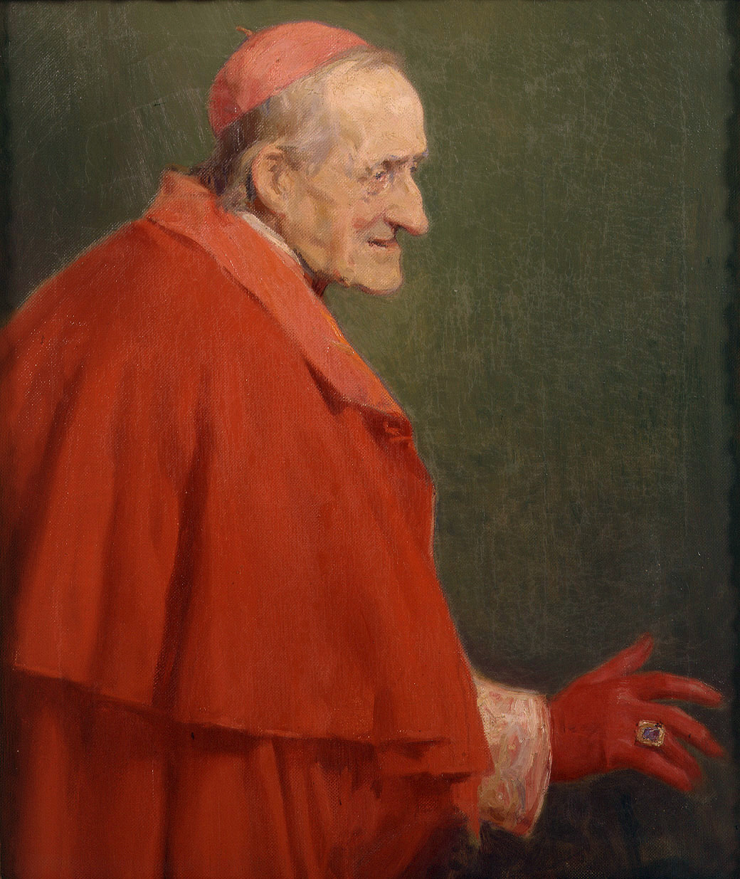 La obra representa a un cardenal romano.